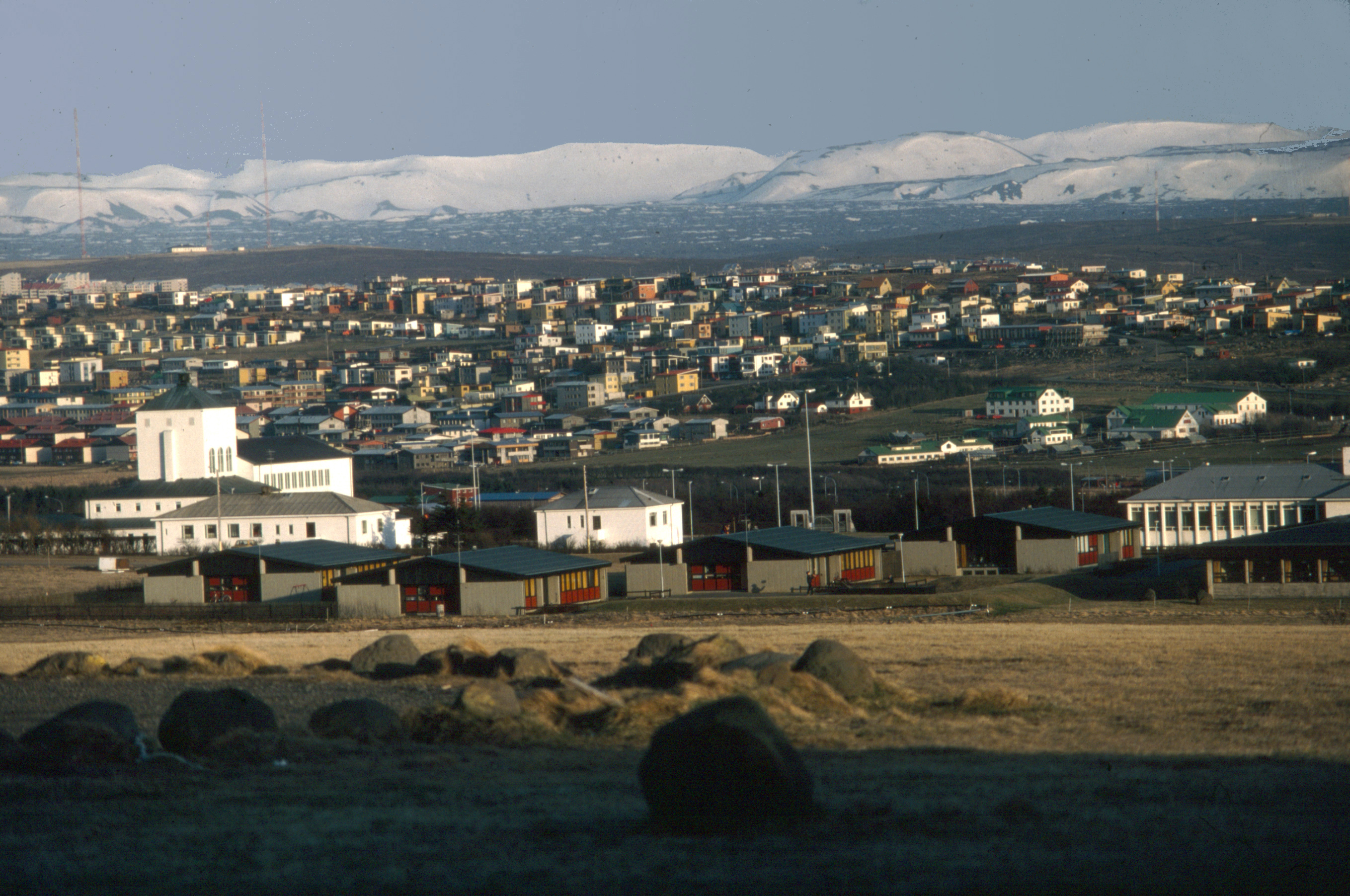 Reykjavík